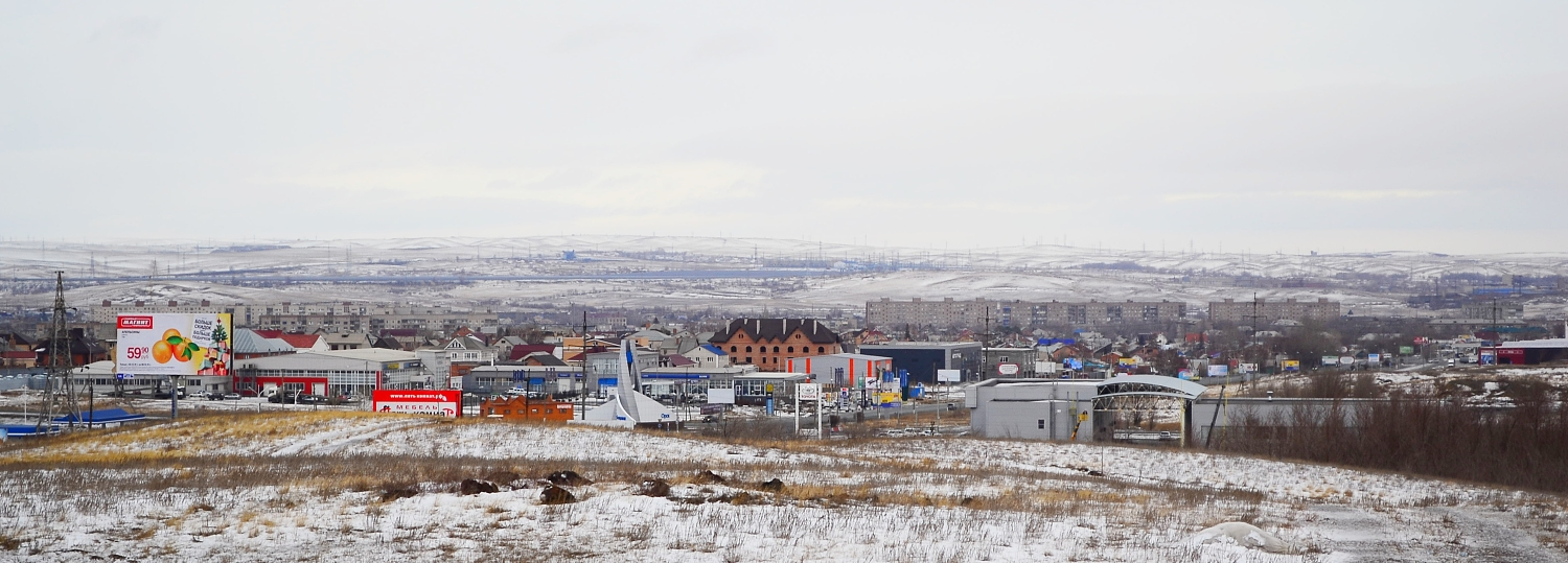 Вид с трассы